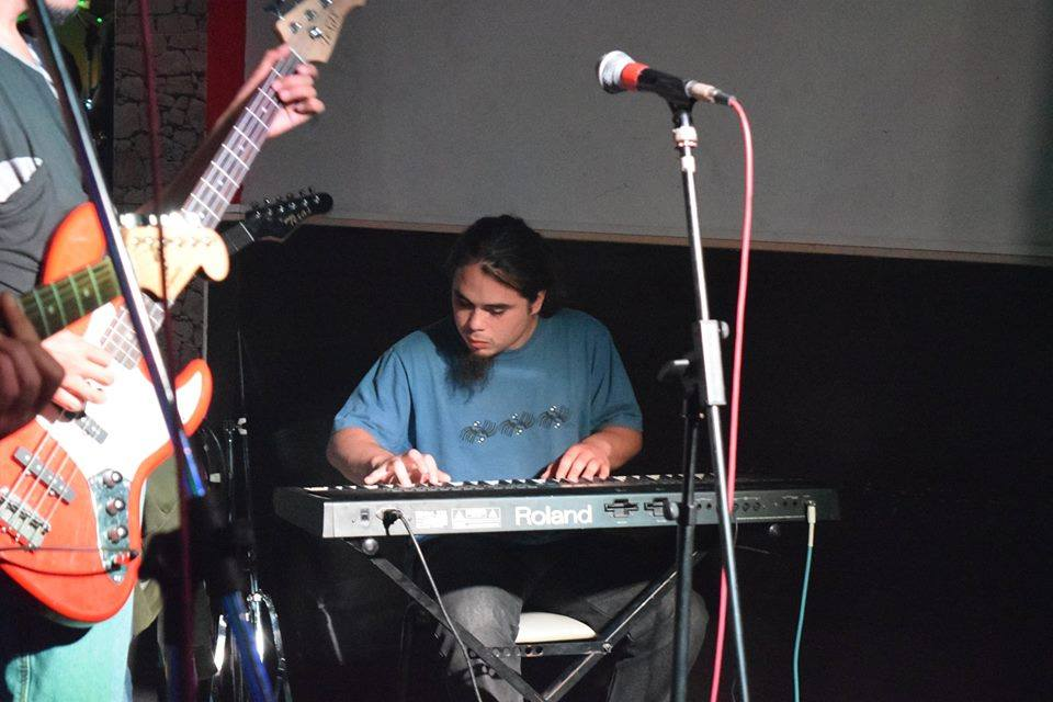 El grupo de rock alternativo Los Hijos de Claudia tocando en Don Pedro Bar el 6 de mayo de 2016.